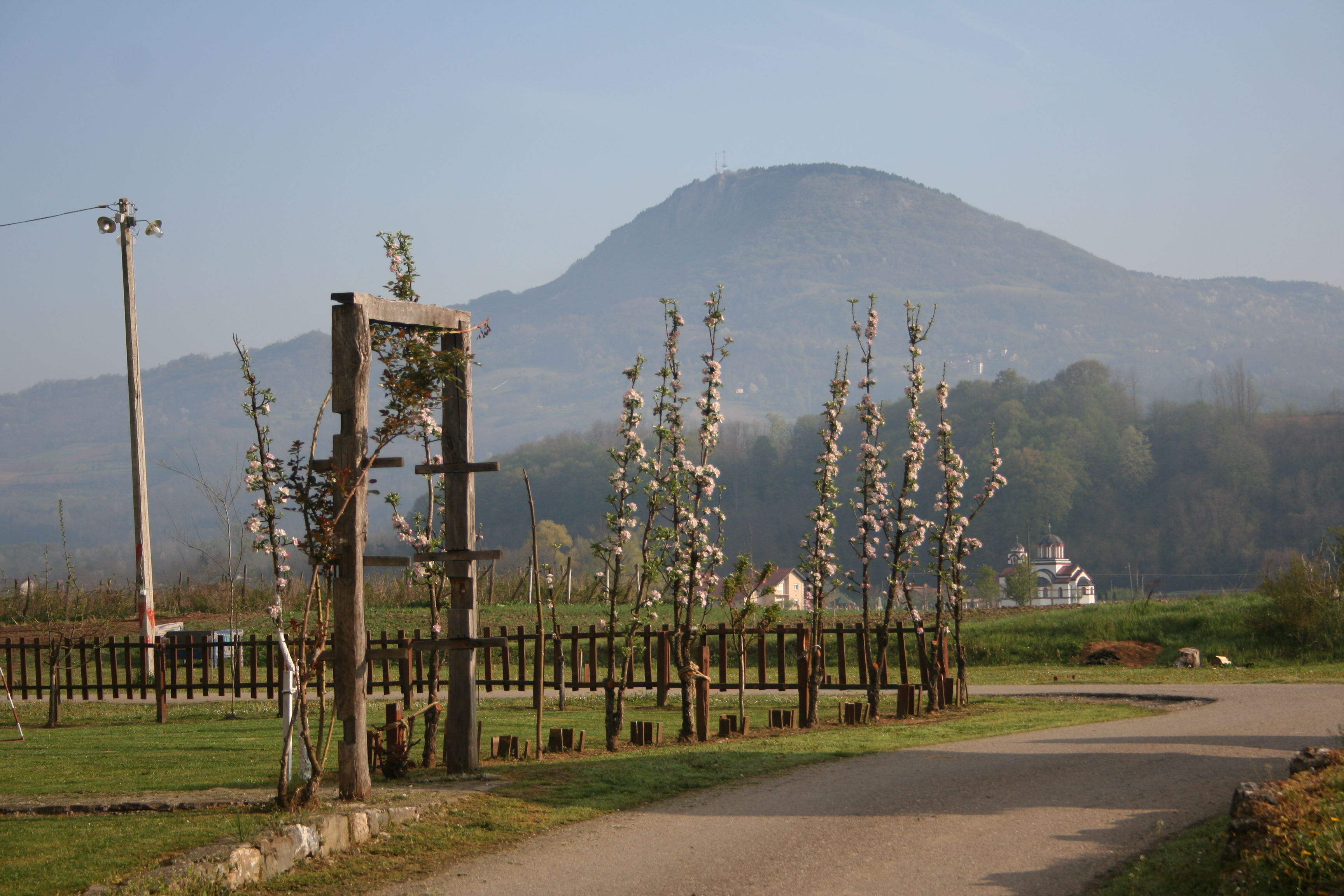 Etno selo Vrhpolje